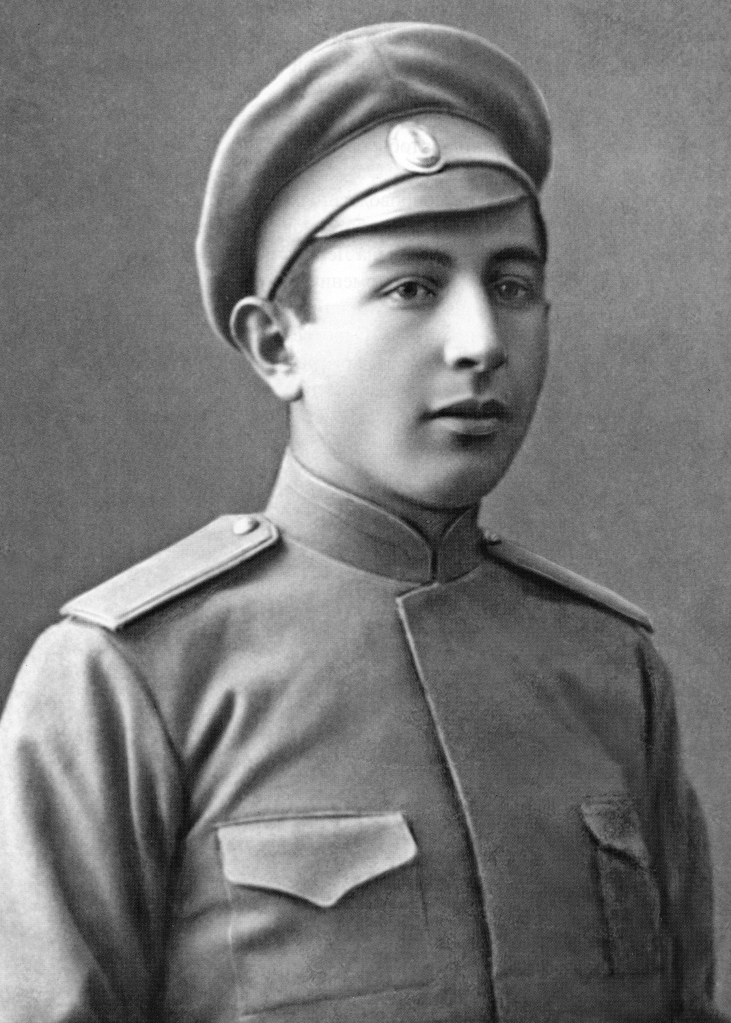 Иван Христофорович Баграмян (1897 — 1982)